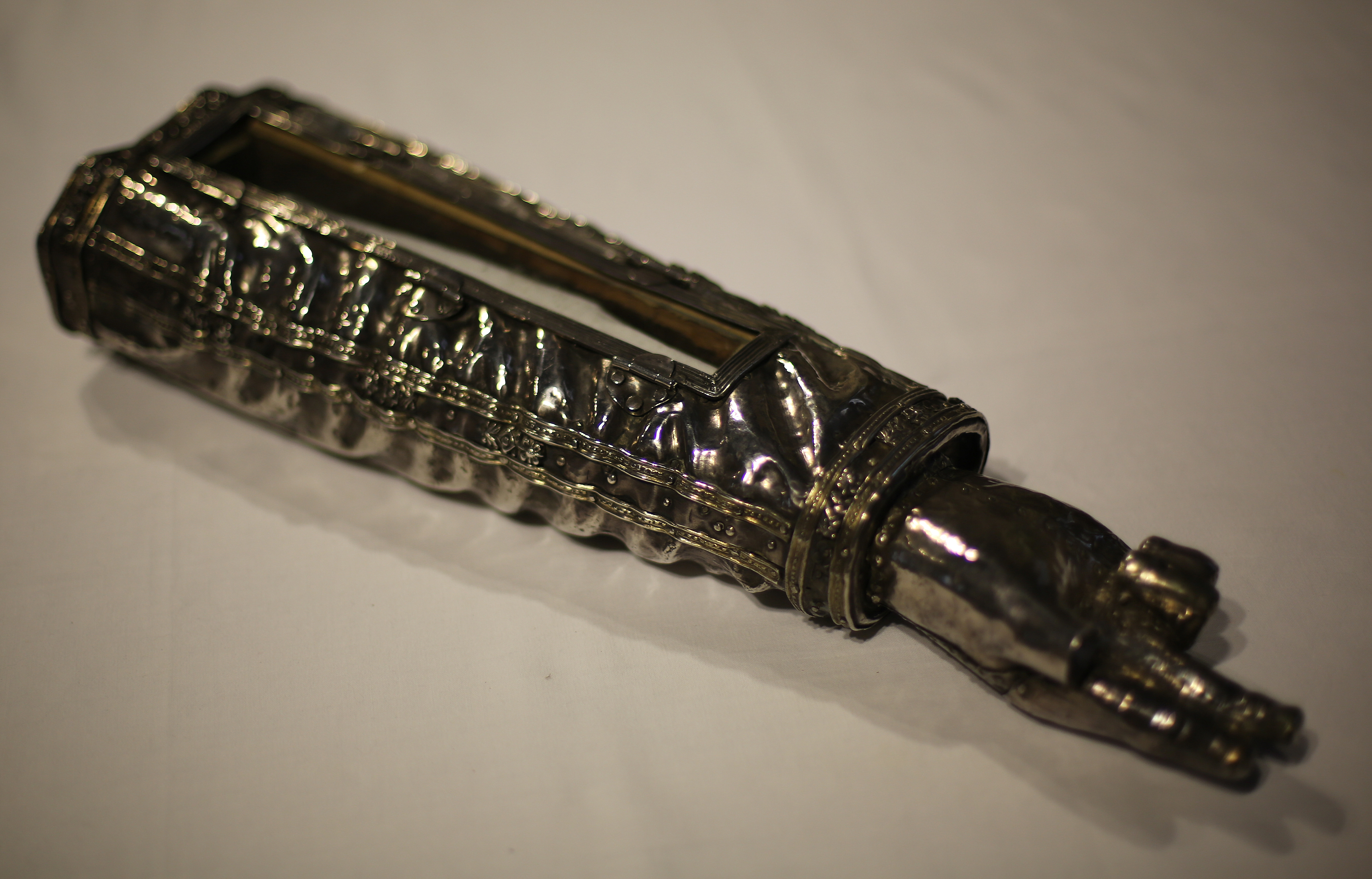 Bras reliquaire de saint Maudet, faisant partie du trésor de Saint-Jean-du-Doigt